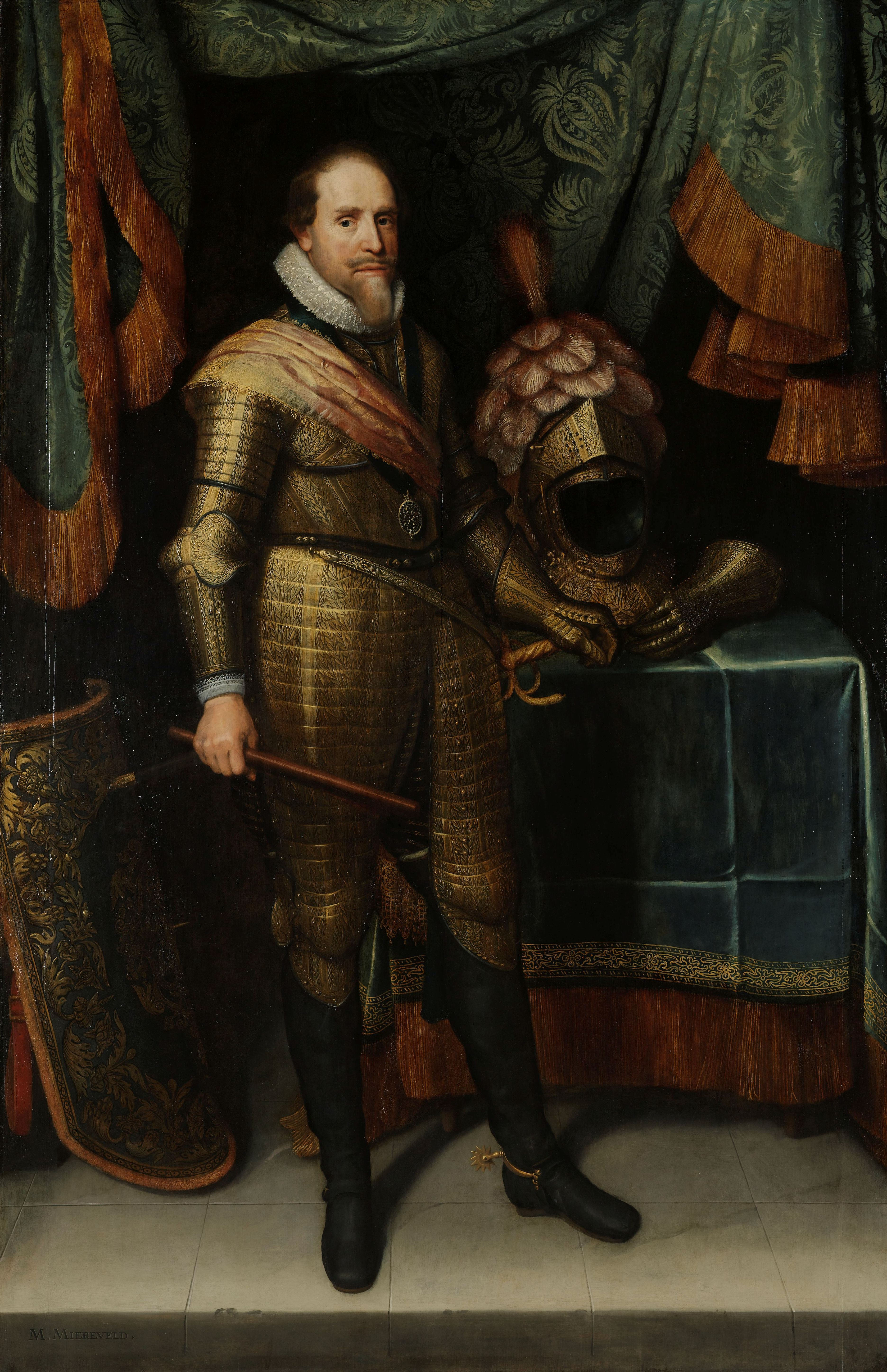 Portret van Maurits, prins van Oranje. Staand, ten voeten uit, in wapenrusting. Links een targe, rechts een tafel waarop helm en handschoen liggen. In de rechterhand een commandostaf.; Michiel Jansz van Mierevelt (1567–1641), olieverf op paneel, ca. 1613–1620